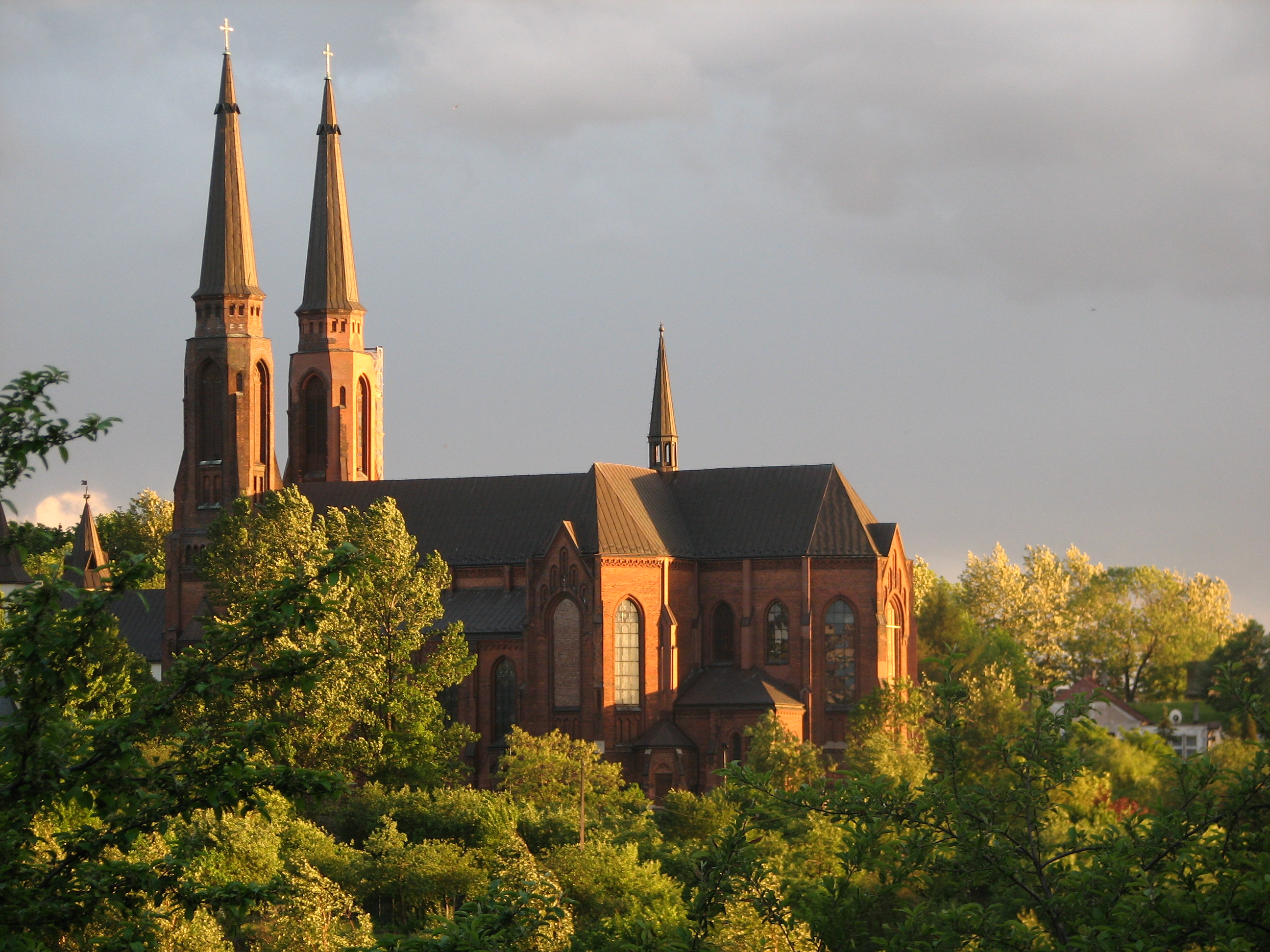 Kościół św Joachima.